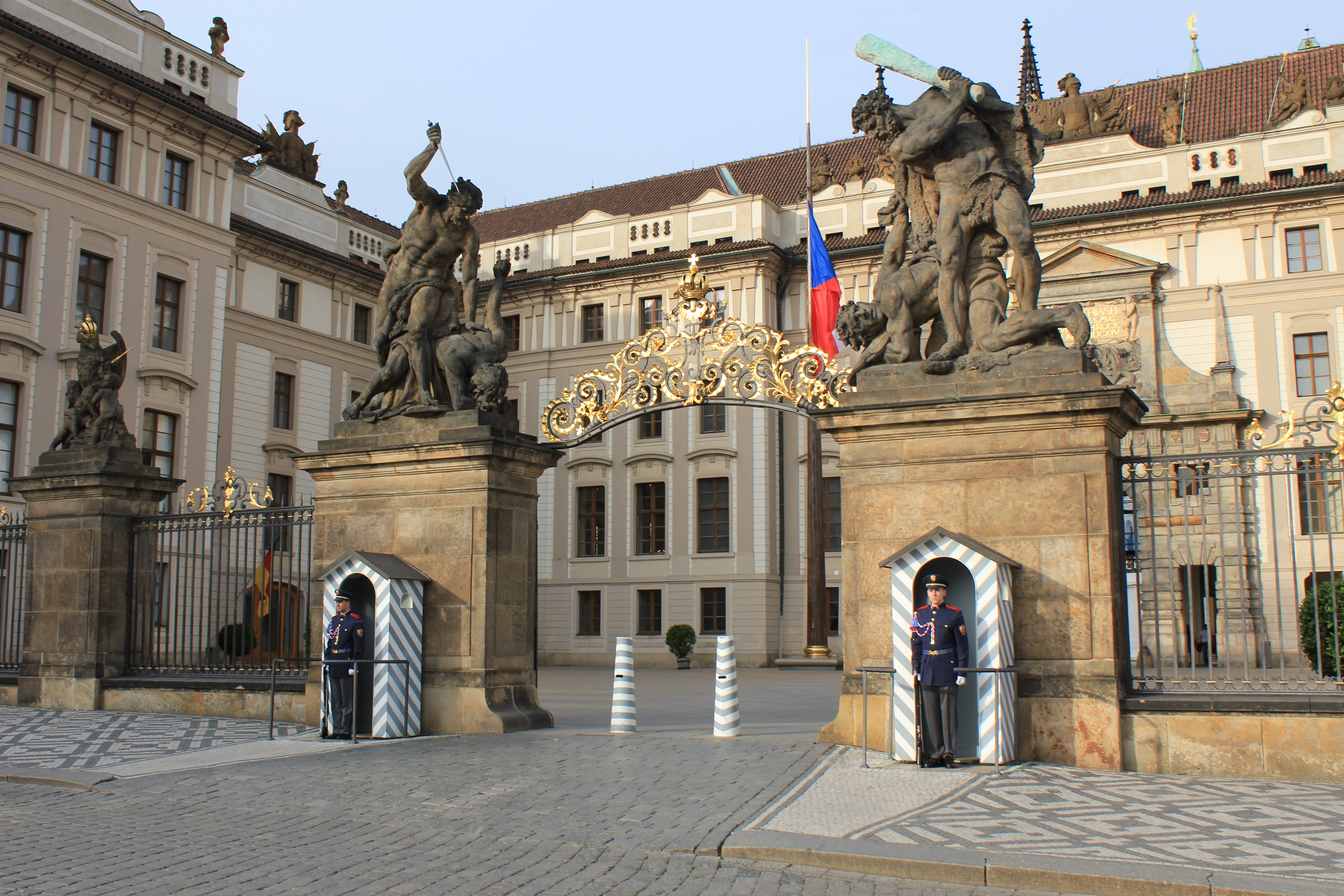 Port ved æresdomstolen i Prahaborgen (1768)